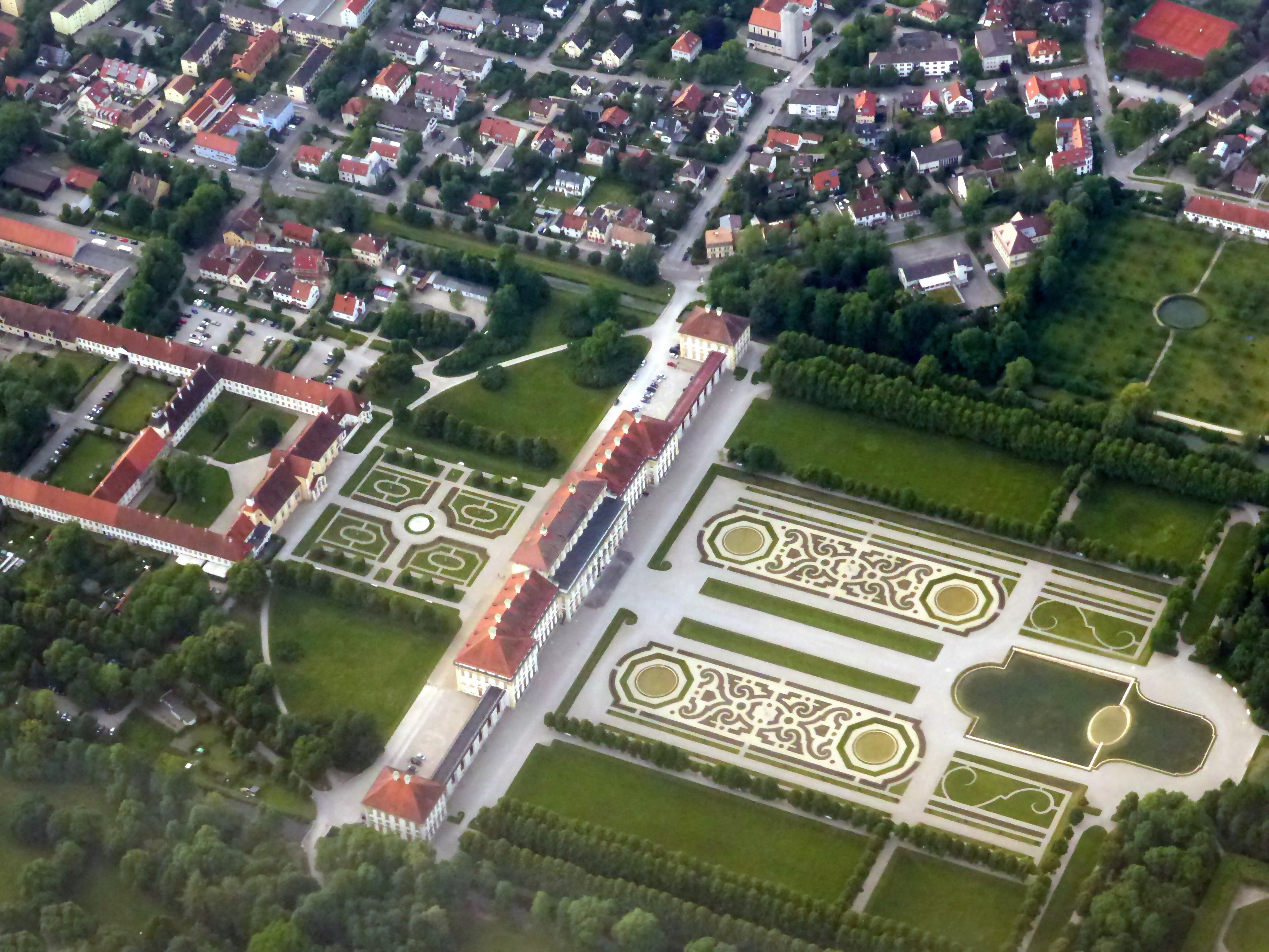 Schloss Schleißheim von oben aus südöstlicher Richtung gesehen.